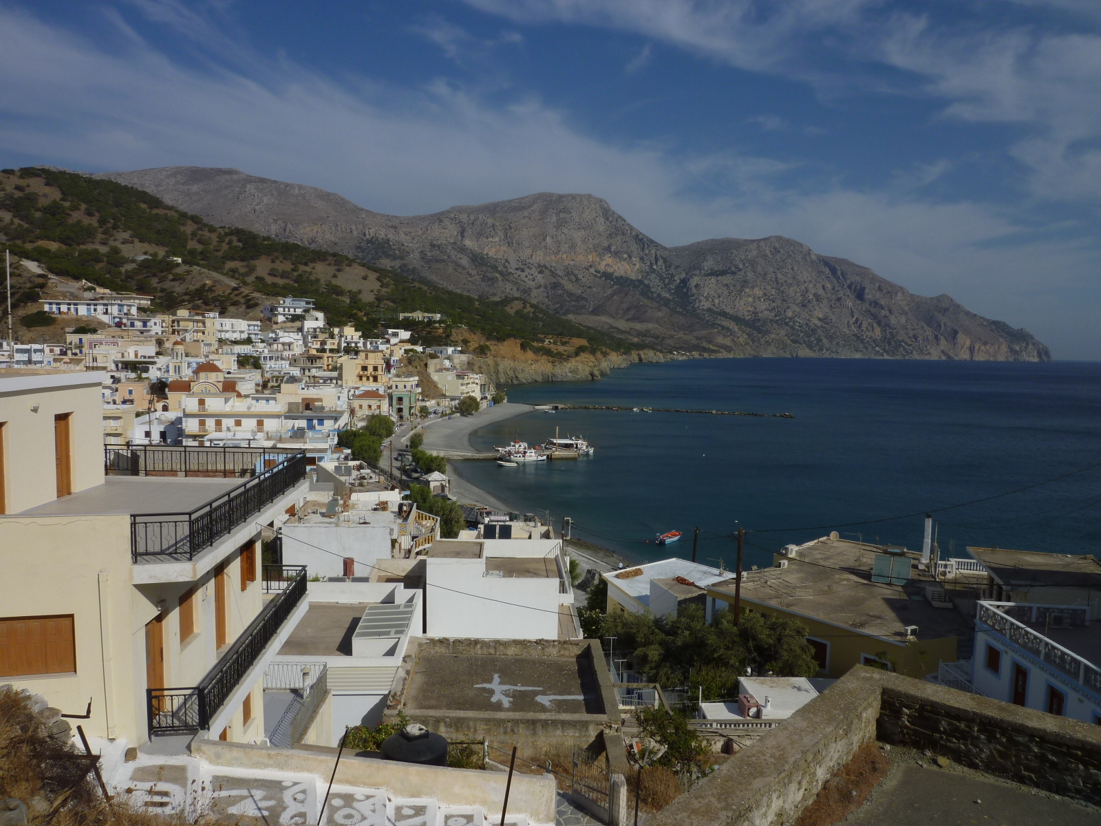 Diafani, Karpathos, Griechenland